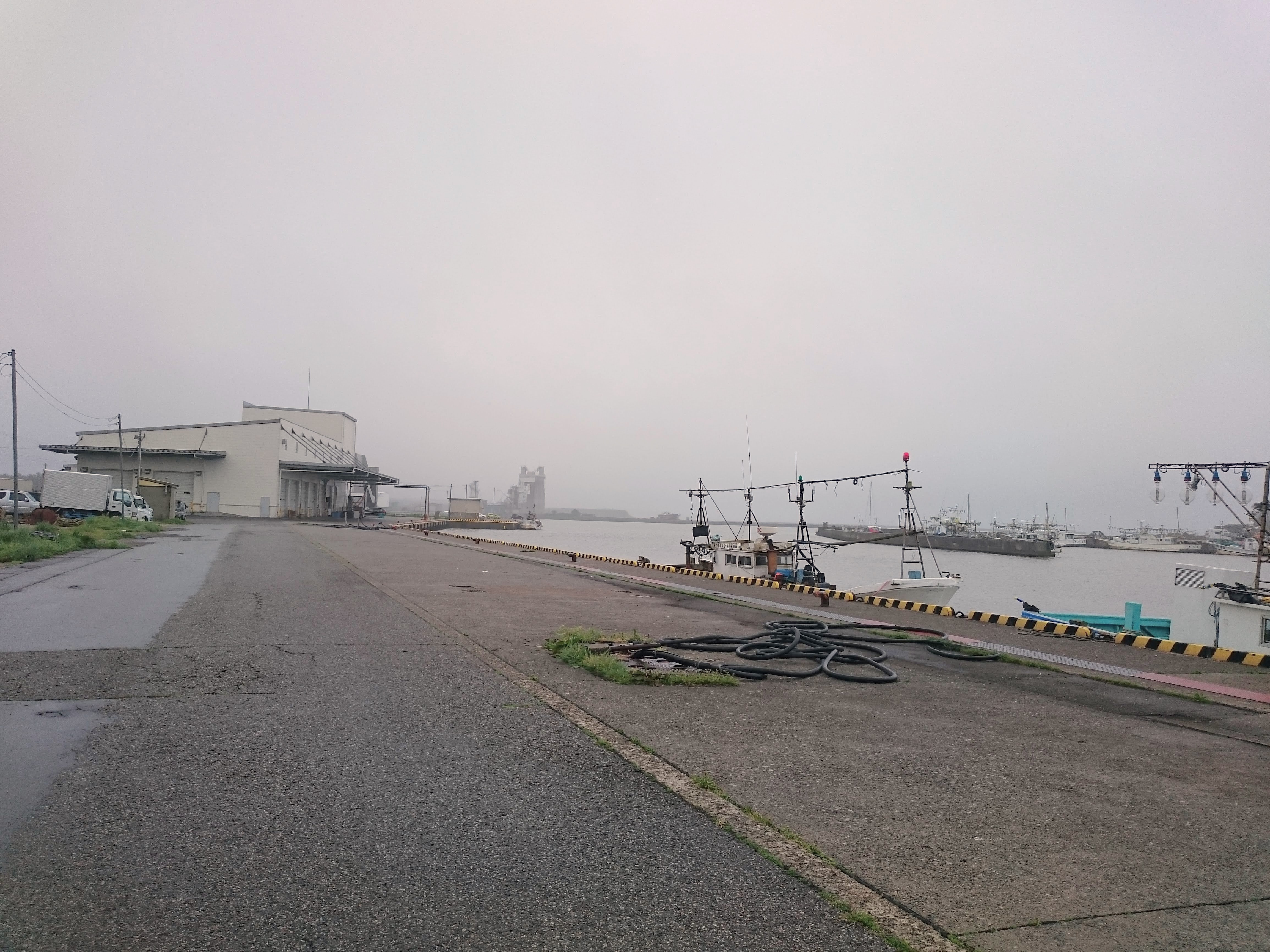 雨天時の岩船港